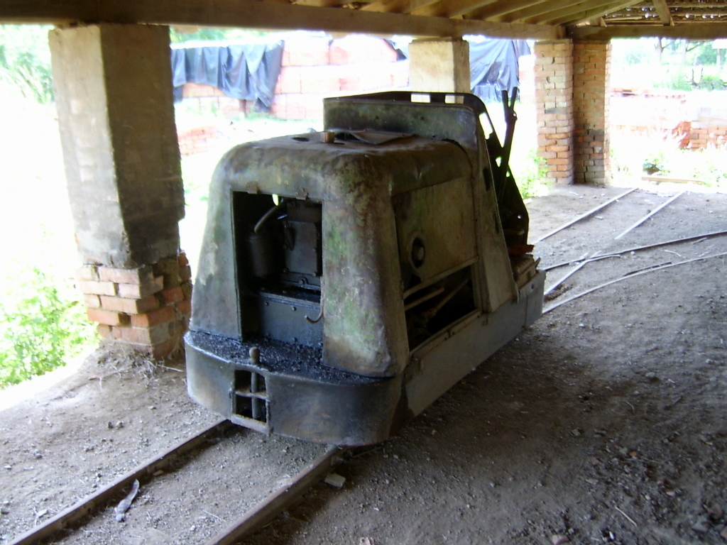 A békési téglagyár 1-es pályaszámú Motoros Vontatója a körkemence melletti vágányon már a gyár leállása után.